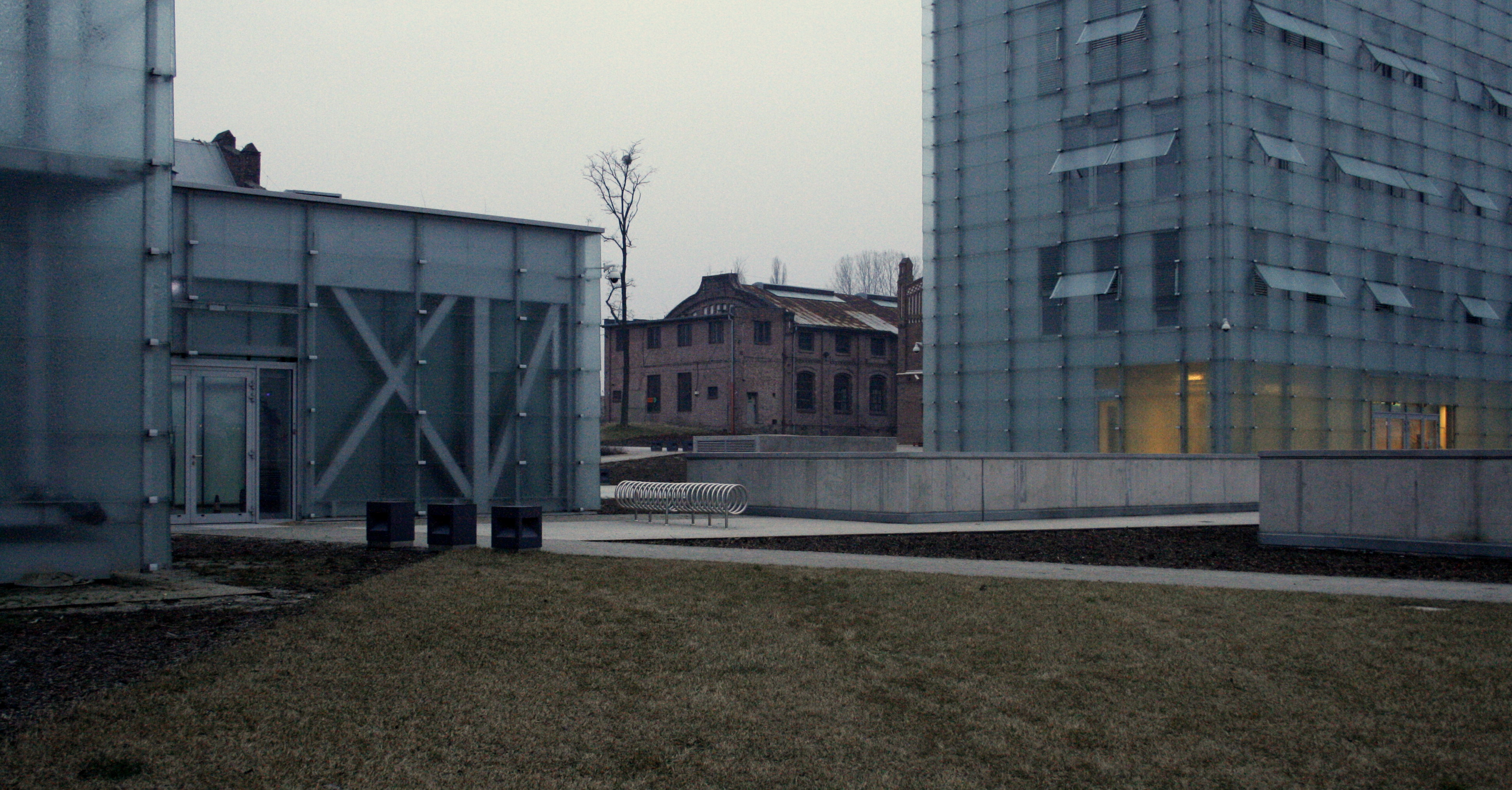 Tereny Nowego Muzeum Śląskiego